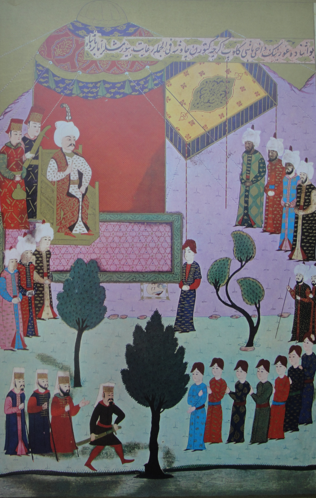 Yavuz Sultan Selim'e Kansu-Gavri'nin kesik basinin getirilmesi. Hunername I, fol.211 a